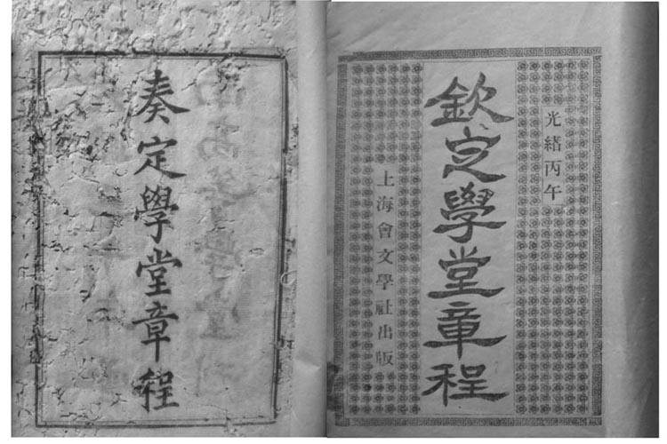 1906年光绪丙午年由上海会文学社出版的钦定学堂章程与云南高等学堂印制的奏定学堂章程。